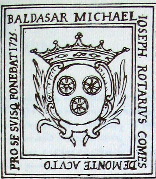 Stemma della famiglia Roero di Asti- da un disegno dell'Incisa del 1806.